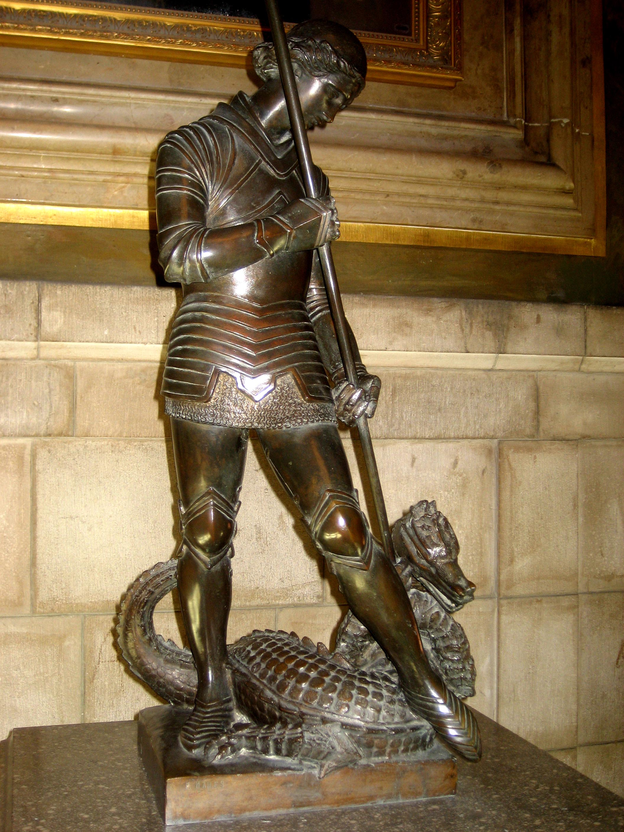 San Jorge de F. Marés en el Salón de San jorge en el Palacio de la Generalidad de Cataluña